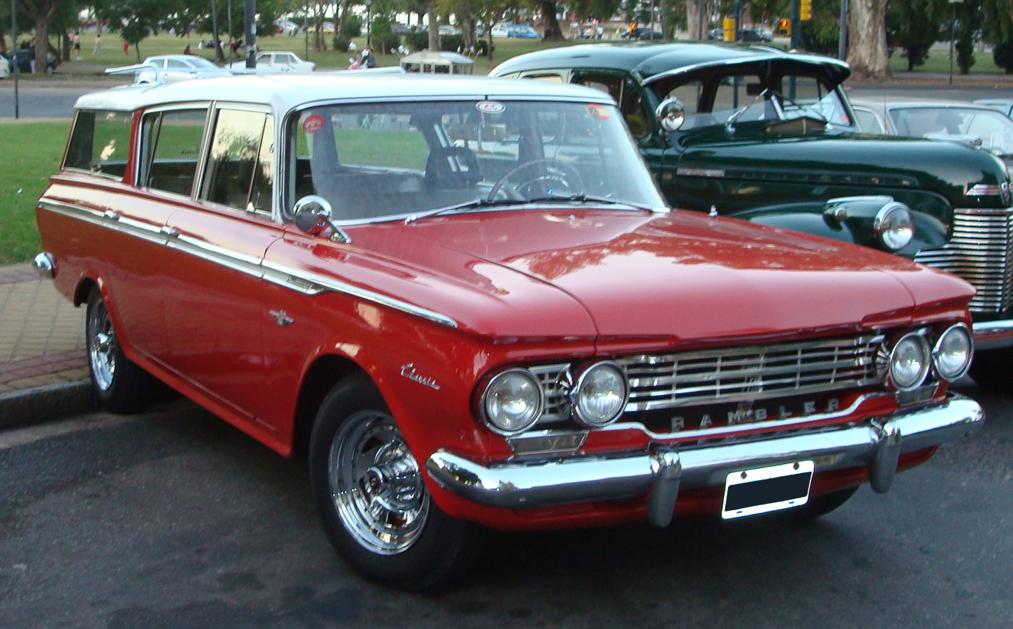 Un modelo IKA Rambler Classic en la ciudad de Rosario, Santa Fe, Argentina.